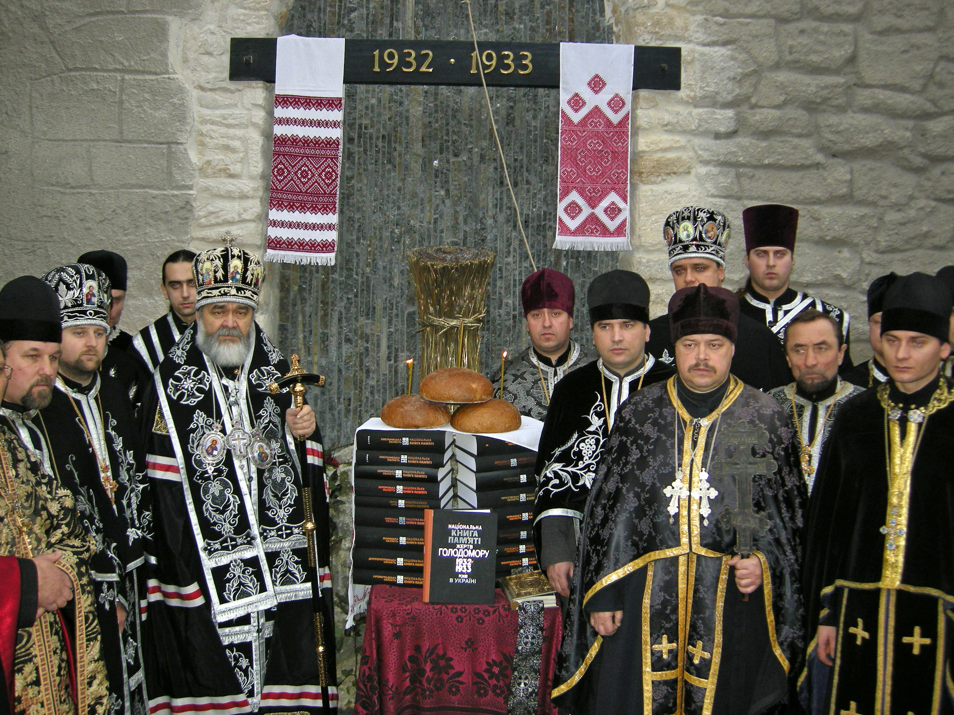 Відзначення річниці Голодомору біля пам'ятника жертвам Голодомору в стіні церкви Різдва Христового в Тернополі. Між священиками — предстоятель Української автокефальної православної церкви, Митрополит Київський і всієї України Мефодій